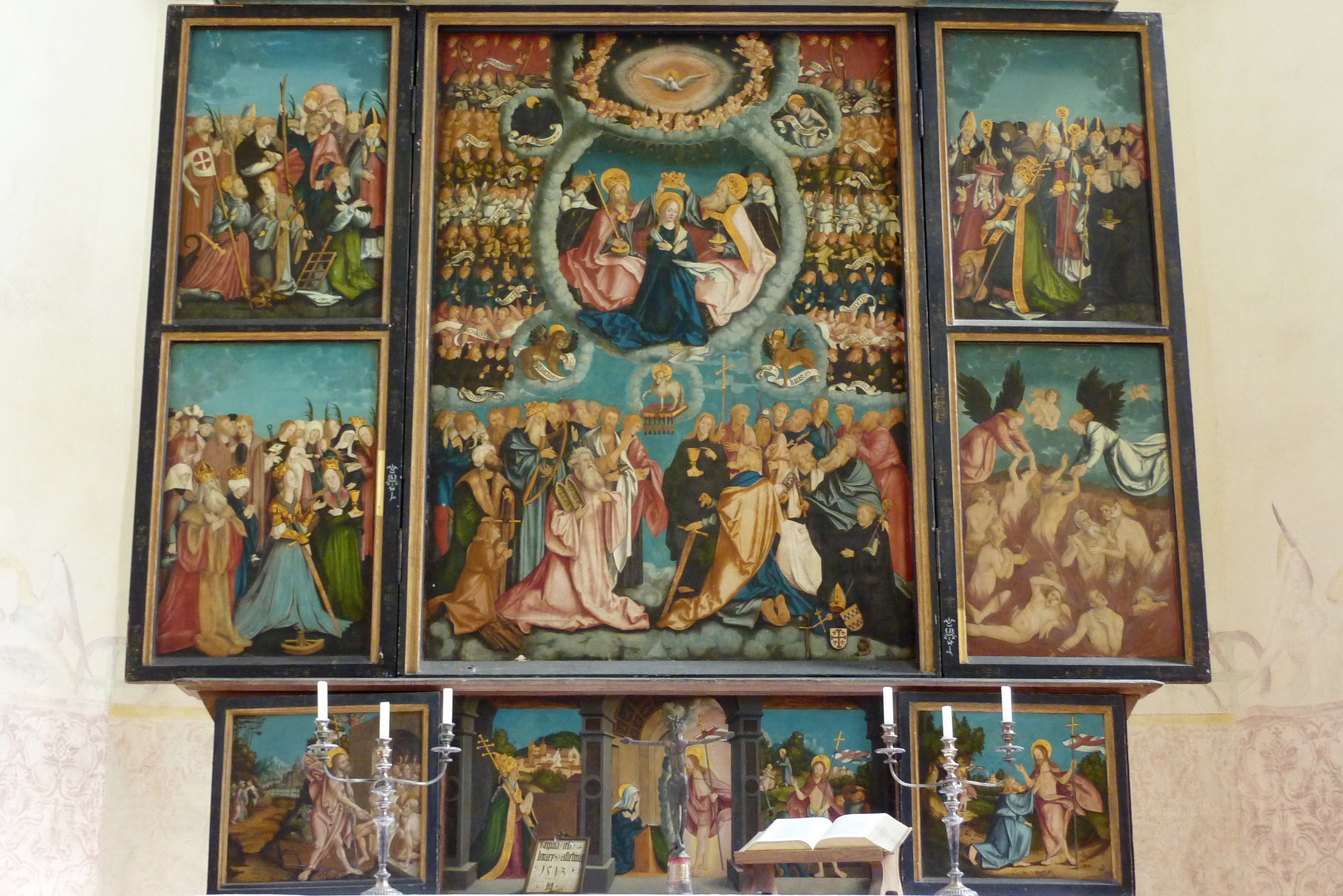 Evangelische Pfarrkirche, ehemalige Benediktinerklosterkirche St. Maria in Auhausen im Landkreis Donau-Ries (Bayern), Hochaltar (Flügelaltar) von Hans Schäufelin und Sebastian Daig von 1513; Darstellung: Krönung Mariens (Mitte), Märtyrer und Nothelfer (links), Kirchenlehrer und geistliche Würdenträger (rechts oben) und Fegefeuer (rechts unten)